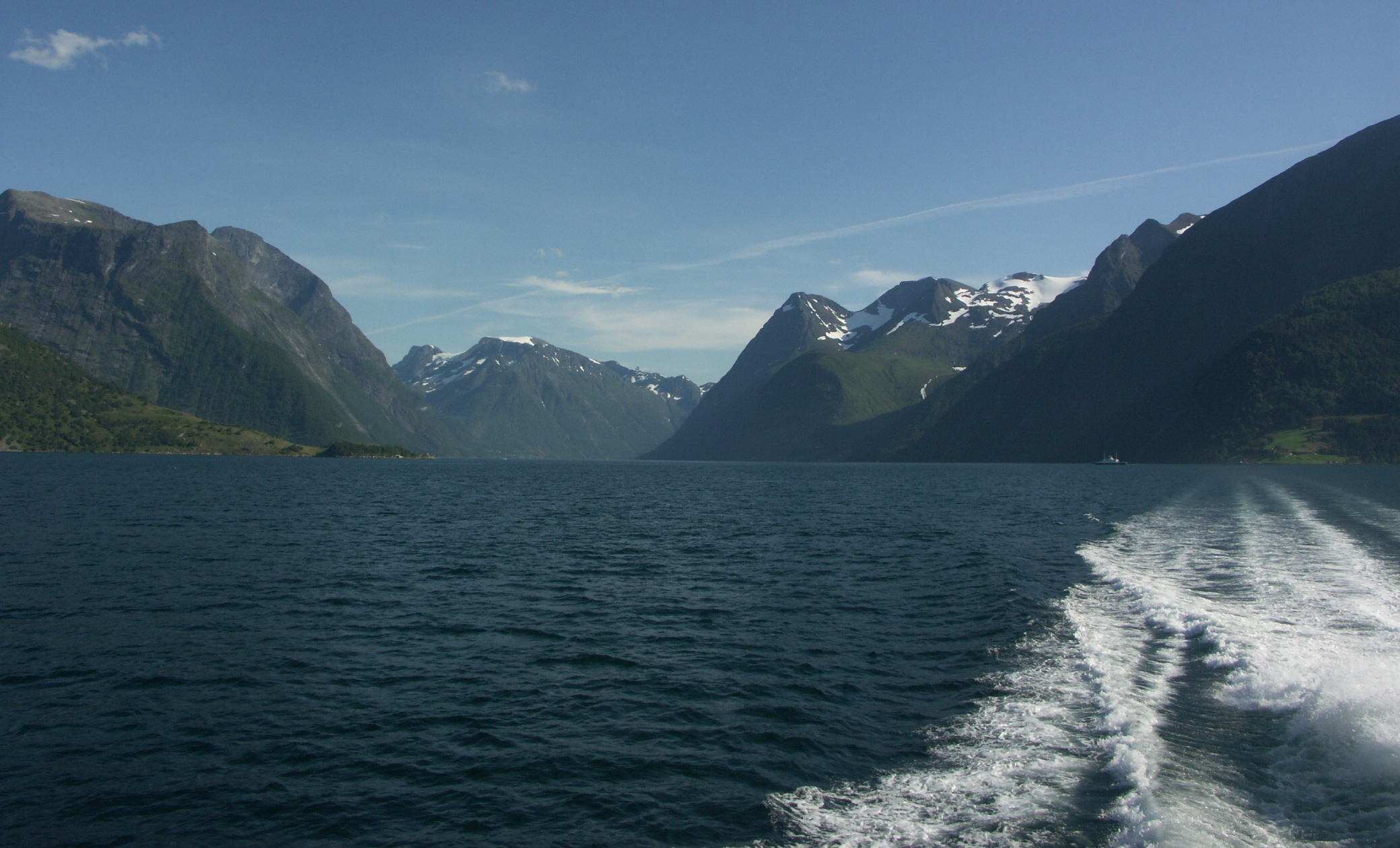 Sunnmørsalpane from Hjørundsfjorden